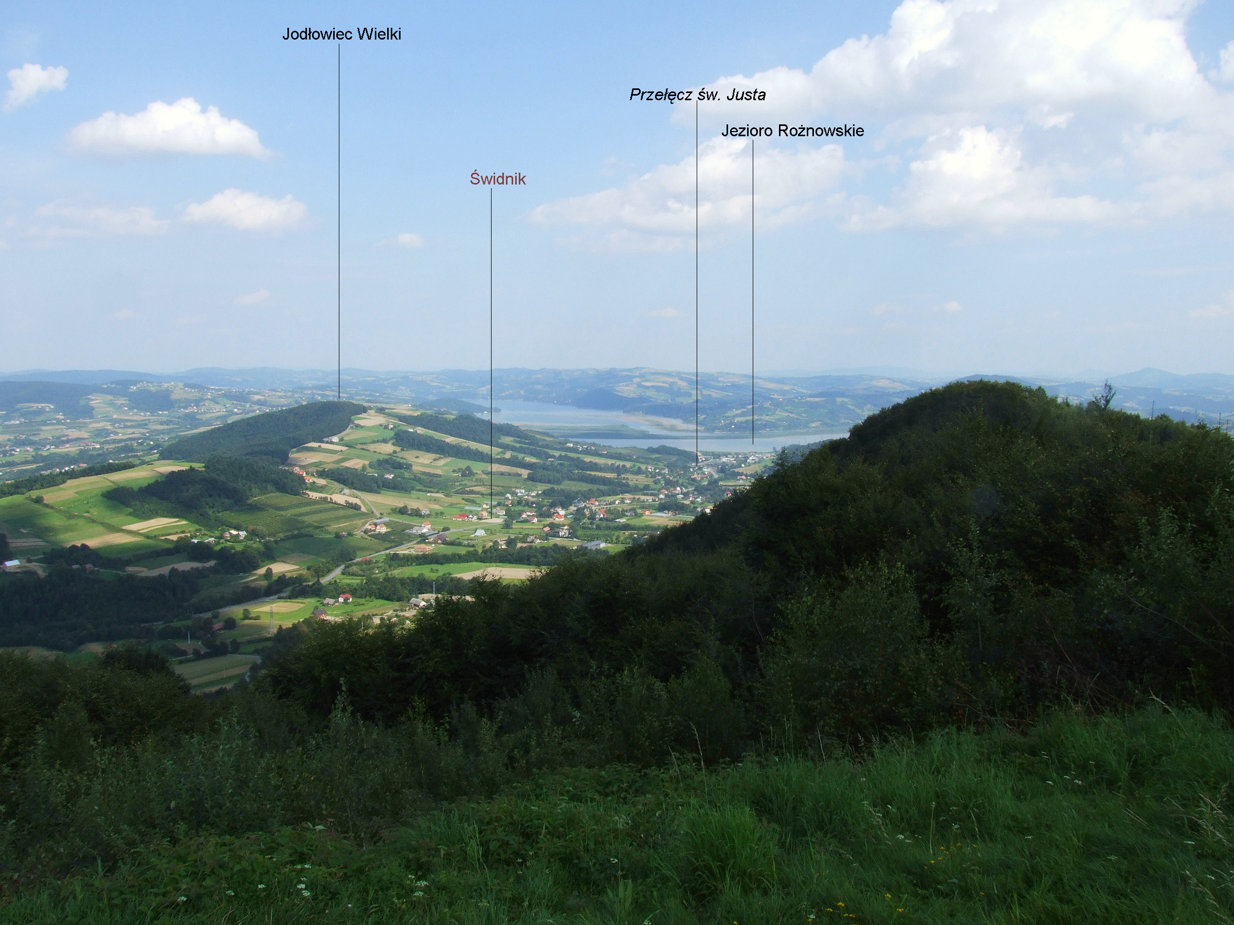 Widok spod Babiej Góry na Jodłowiec Wielki (na środku), miejscowość Świdnik i Jezioro Rożnowskie